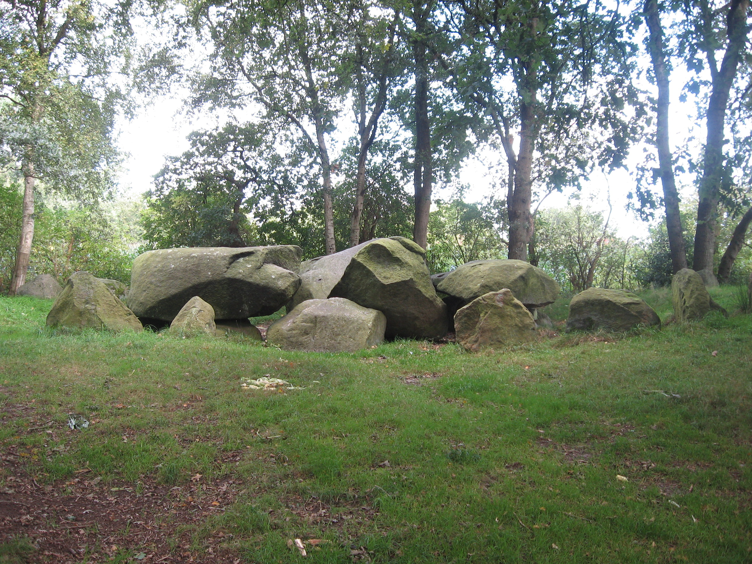 Großsteingrab Bülzenbett nördlich von Sievern (Ortsteil der Stadt Langen bei Bremerhaven); von Süden aus Richtung Pipinsburg kommend aufgenommen; mittlerer gespaltener Deckstein von ursprünglich drei Decksteinen (bis 1870 nachgewiesen)